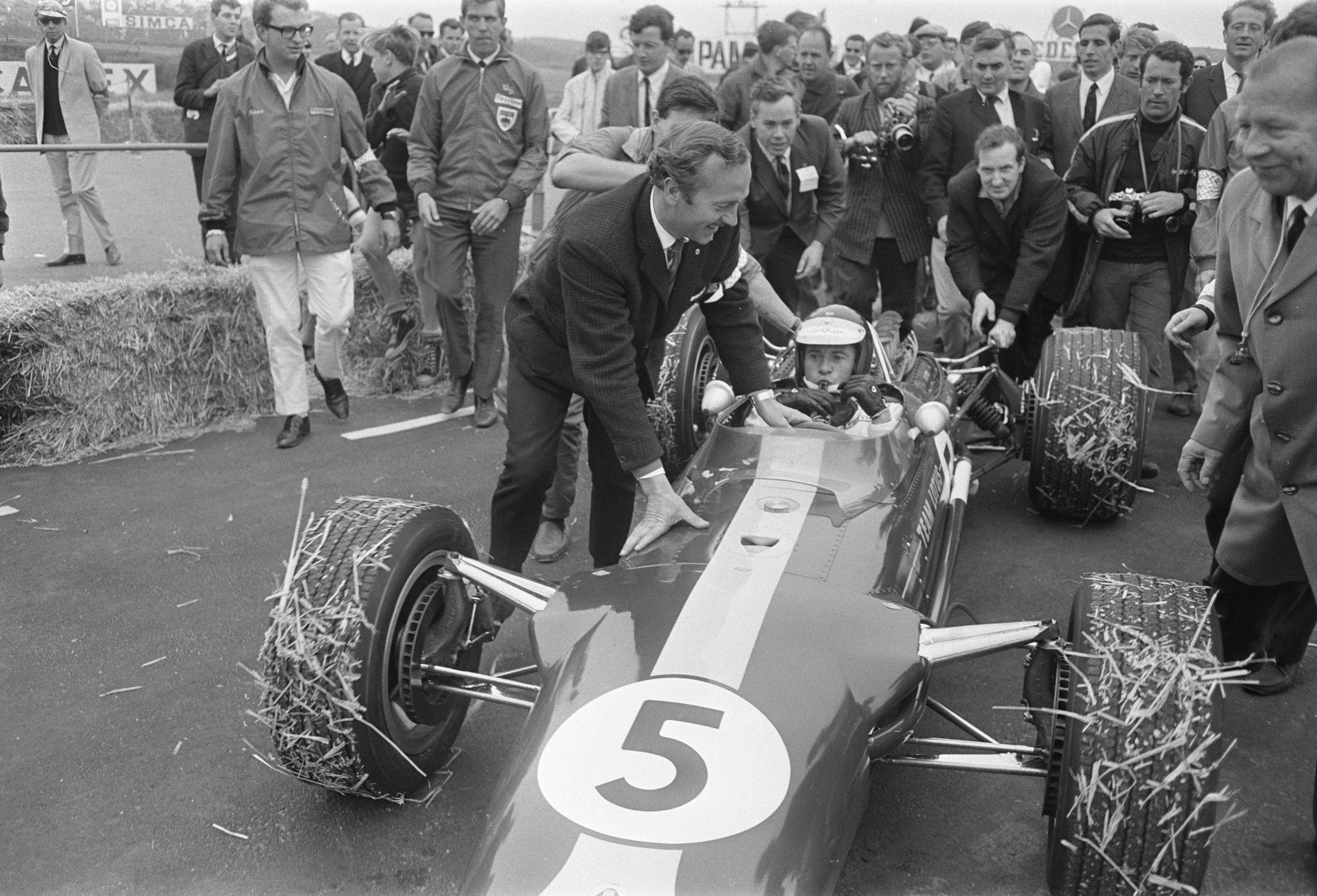 Grand Prix te Zandvoort, Jim Clark na de race.